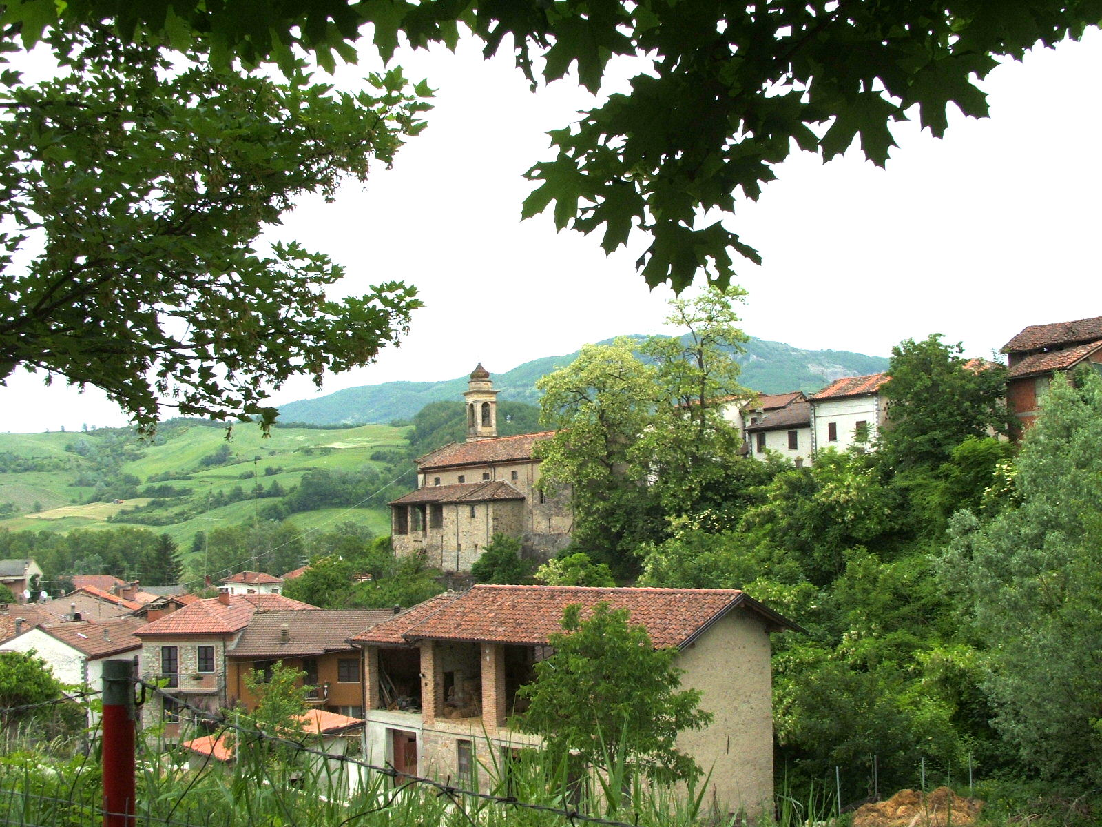 Nostre foto dalla Val Curone Brignano-Frascata - panorama